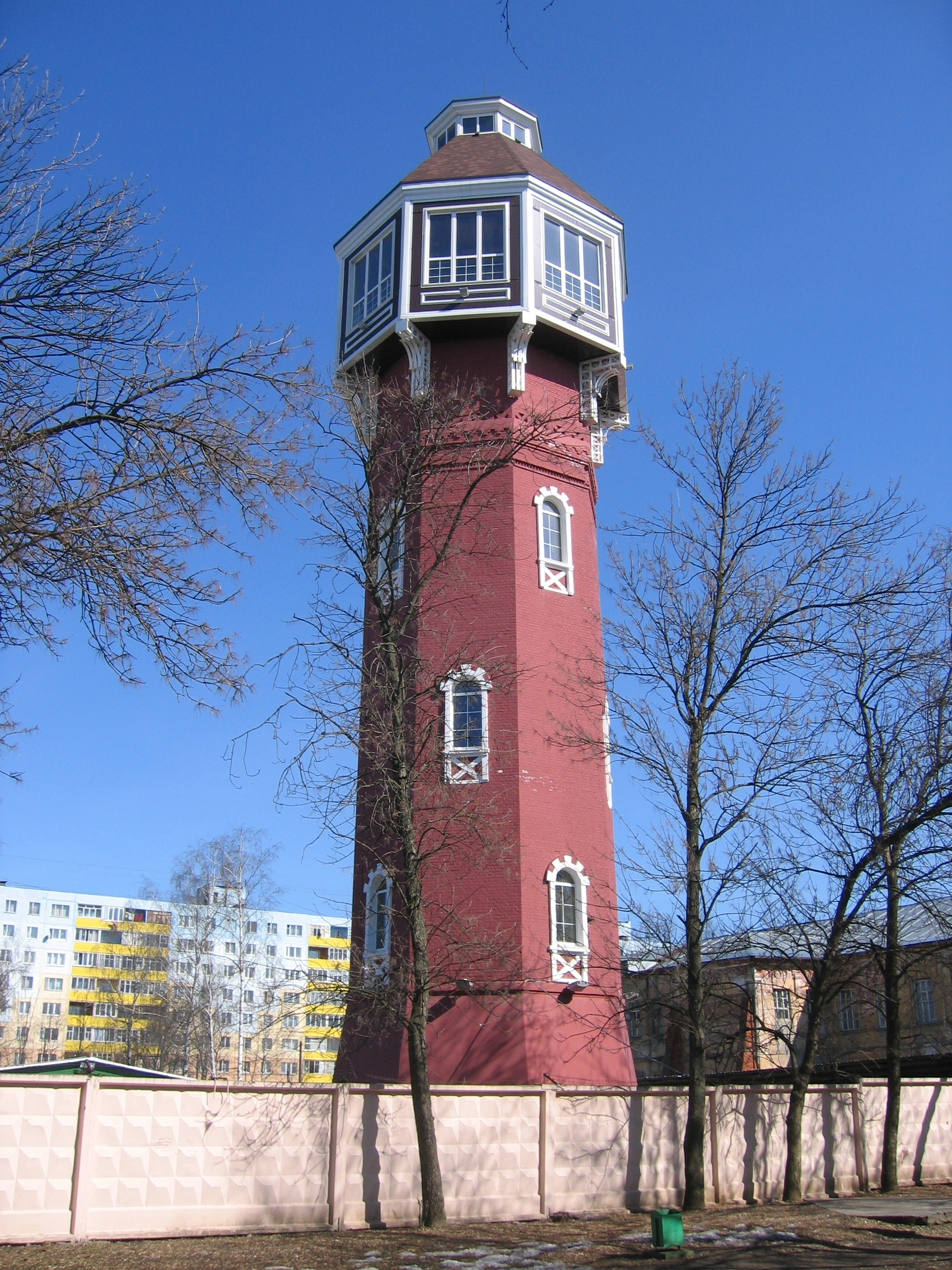 Старая каланча в Ногинске